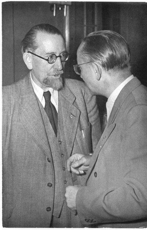 Illus-Sturm 15.9.1951- Ausserordentliche Volkskammersitzung Am 15.9.1951 fand im Haus der Volkskammer in Berlin eine Ausserordentliche Sitzung der Volkskammer statt, auf der Ministerpräsident Grotewohl eine Regierungserklärung abgab. UBz: Wilhelm Koenen im Gespräch mit dem Stellvertr. Ministerpräsidenten Dr. Loch [Hans].